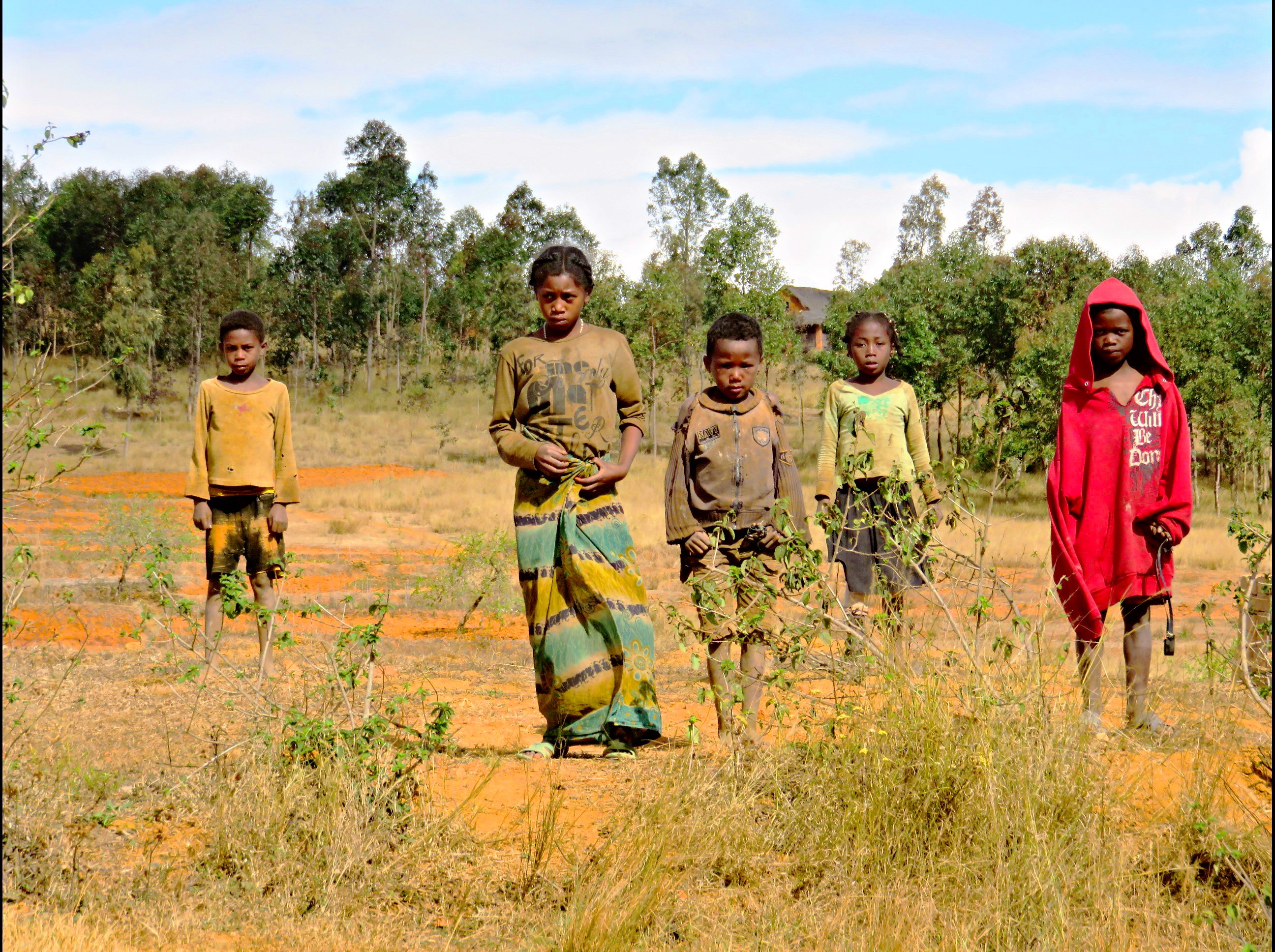 Mahaditra, Fianarantsoa, Madagascar This is an image with the theme "Play" from: Madagascar